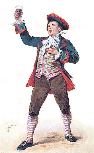 Meneghino in una stampa ottocentesca